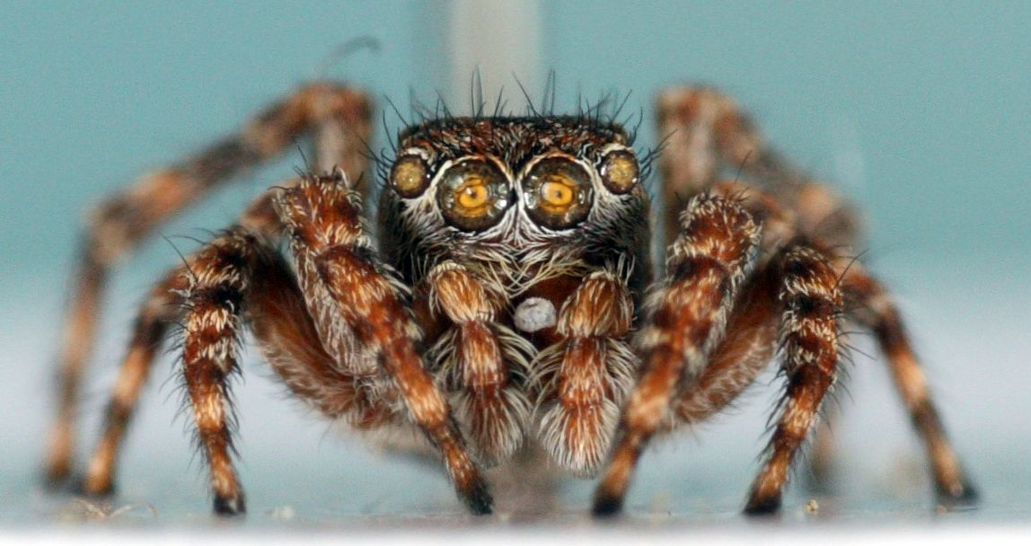 Hunn av hoppeedderkopp Sitticus floricola eller S. distinguendus, jeg er ikke sikker på arten